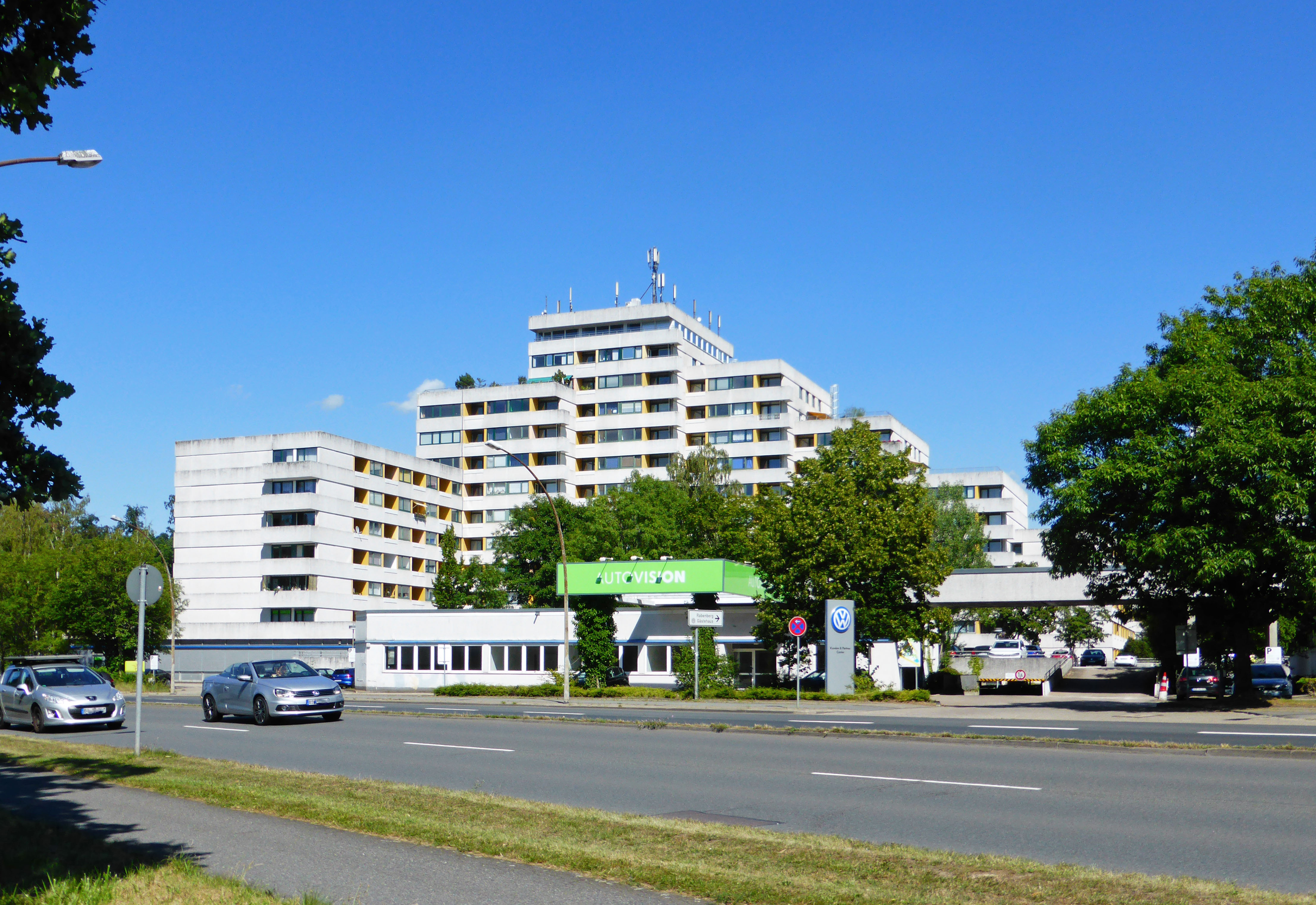 Burgwallcenter in Wolfsburg, von der Braunschweiger Straß aus gesehen.